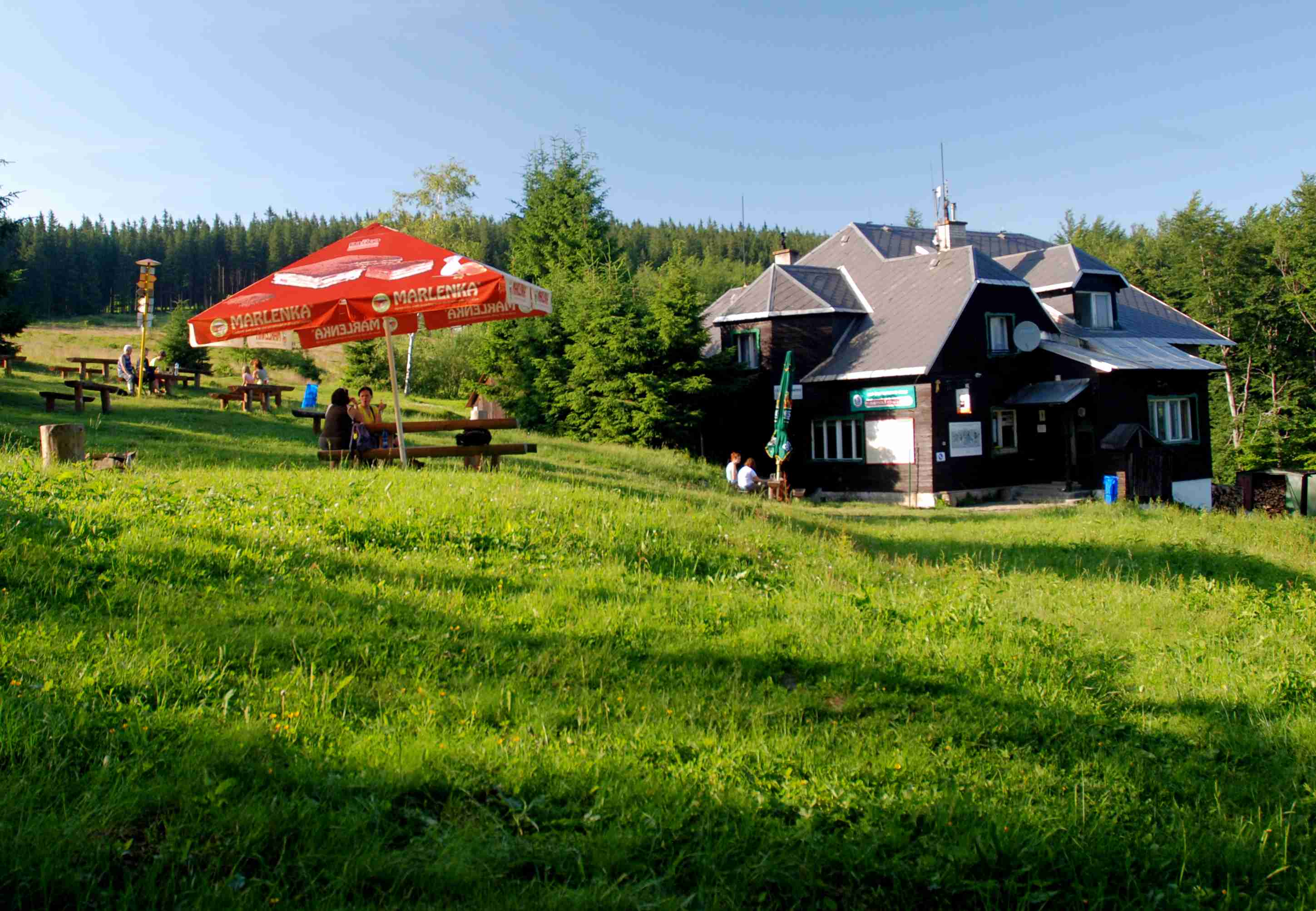 Turistická chata na beskydském vrcholu Ostrý